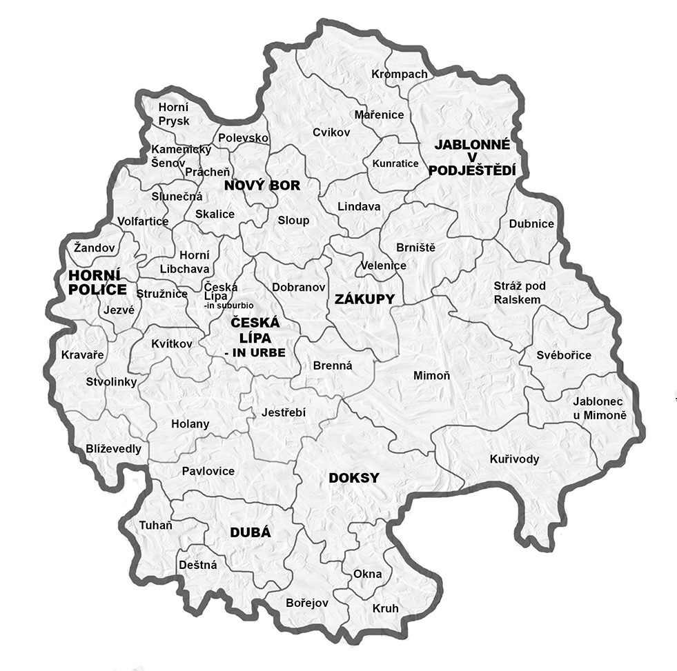 Diecéze litoměřická, českolipský vikariát - farnosti